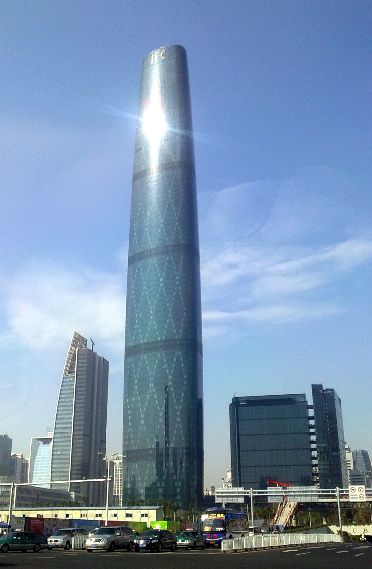 广州国际金融中心